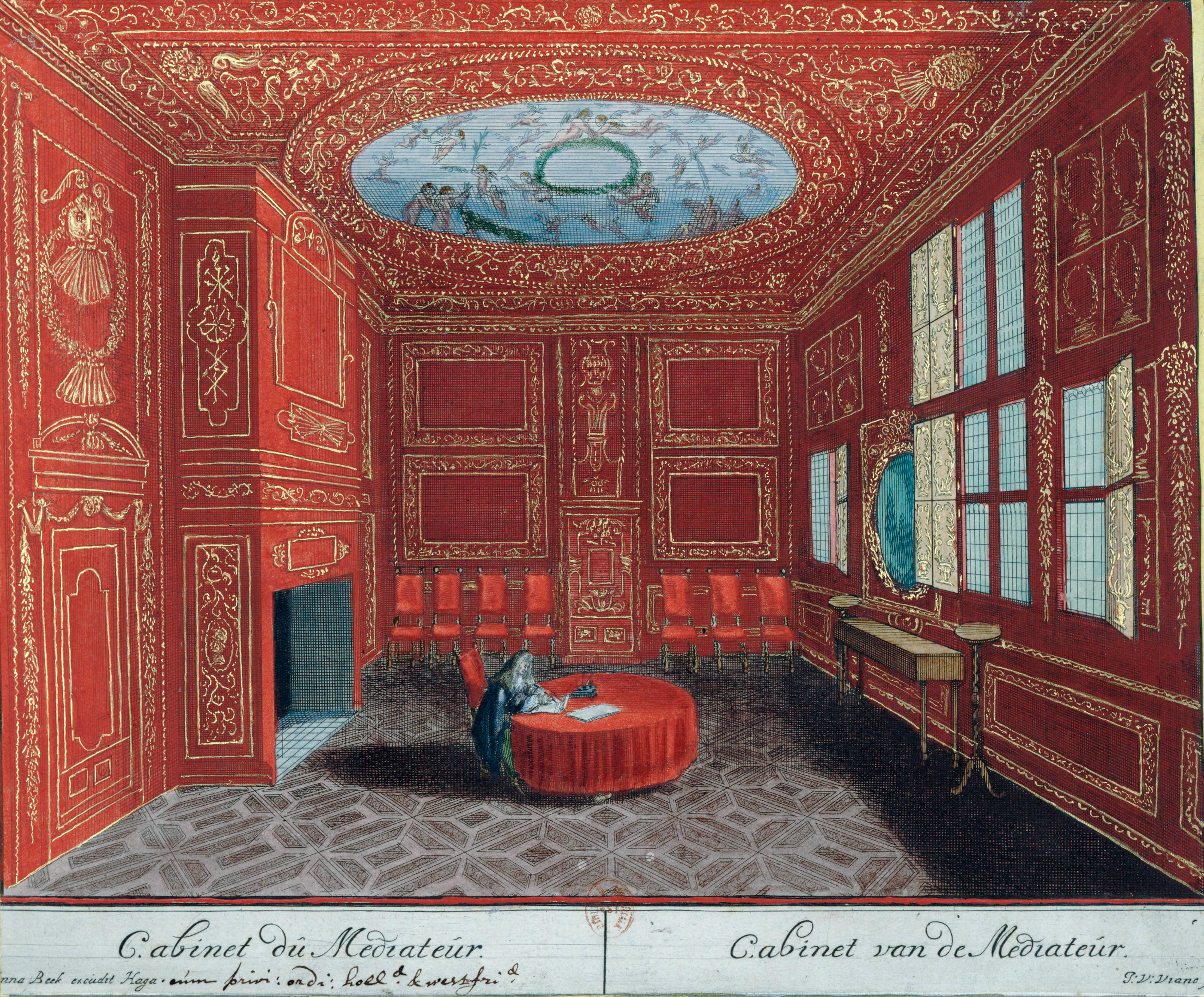 Cabinet du Médiateur, le diplomate suédois Nils Lillieroot. Traités de Ryswick (1697).